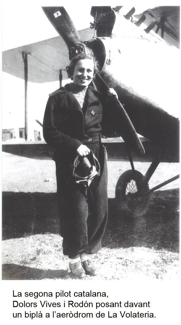 Dolors Vives i Rodón posant davant un biplà a l'areòdrom de la Volateria